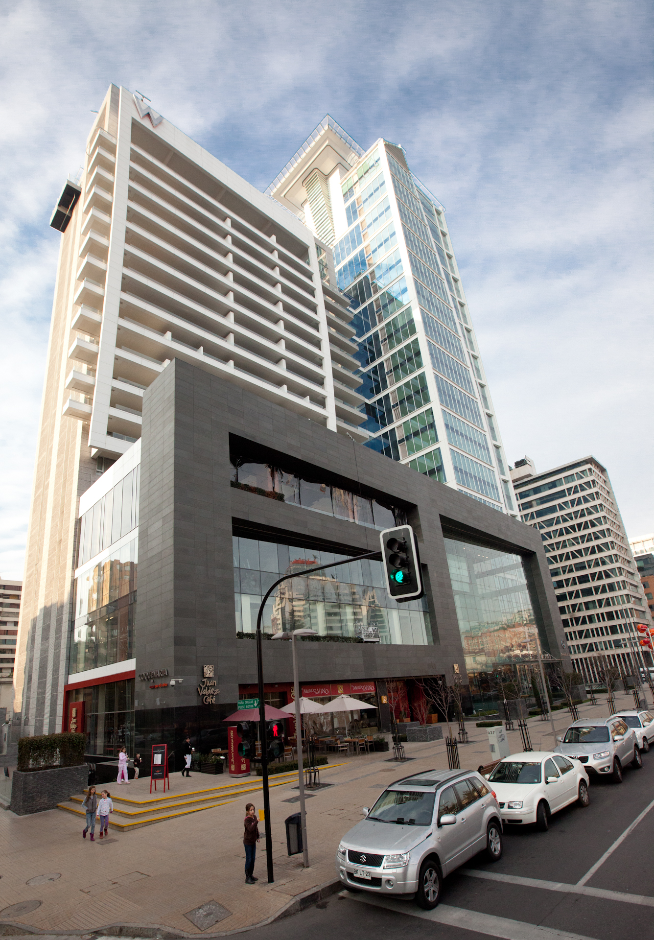 Isidora 3000, Hotel W, @ Sanhattan, a financial district in eastern Santiago de Chile.